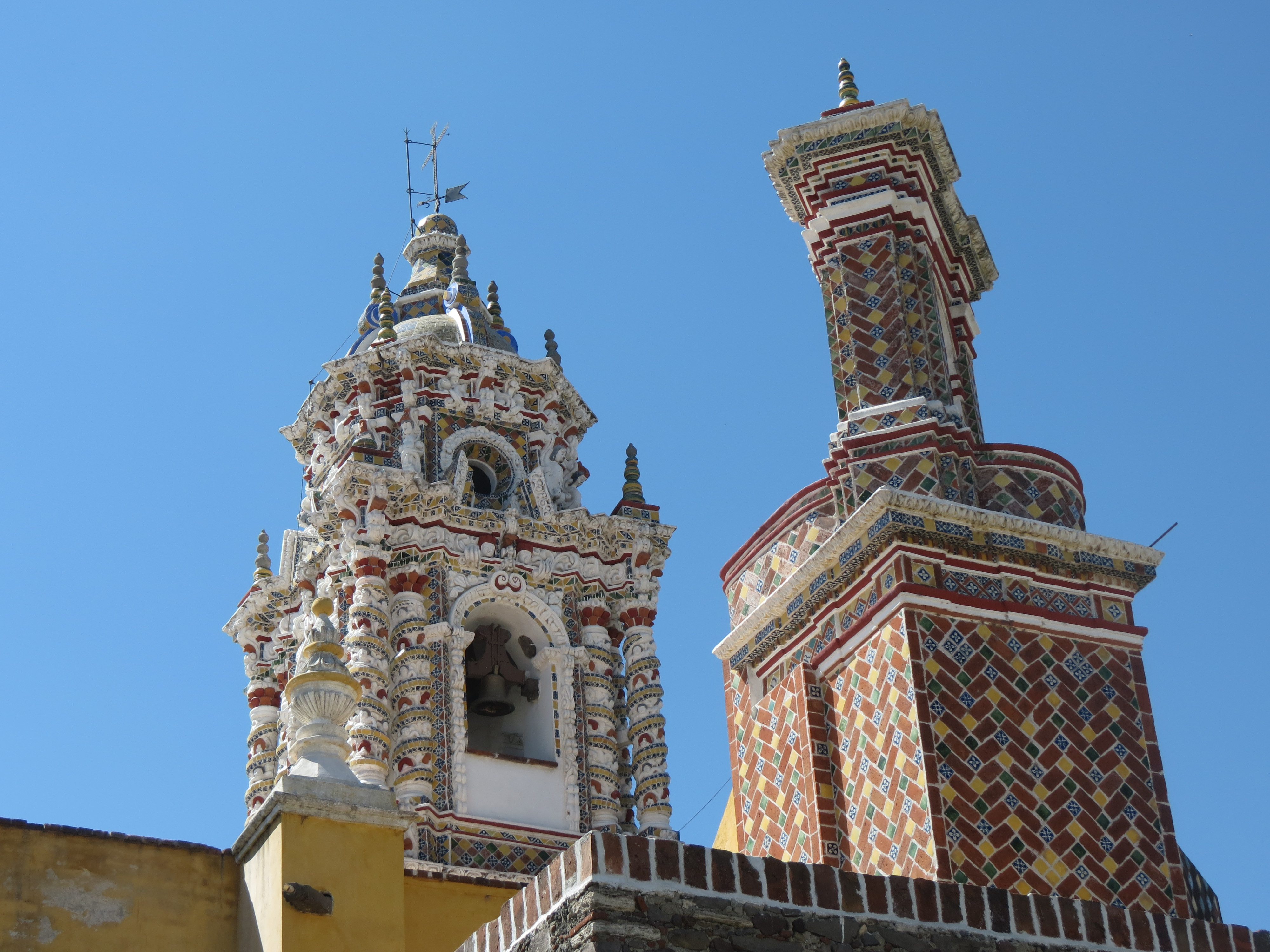 Vista lateral del Templo de San Francisco Acatepec